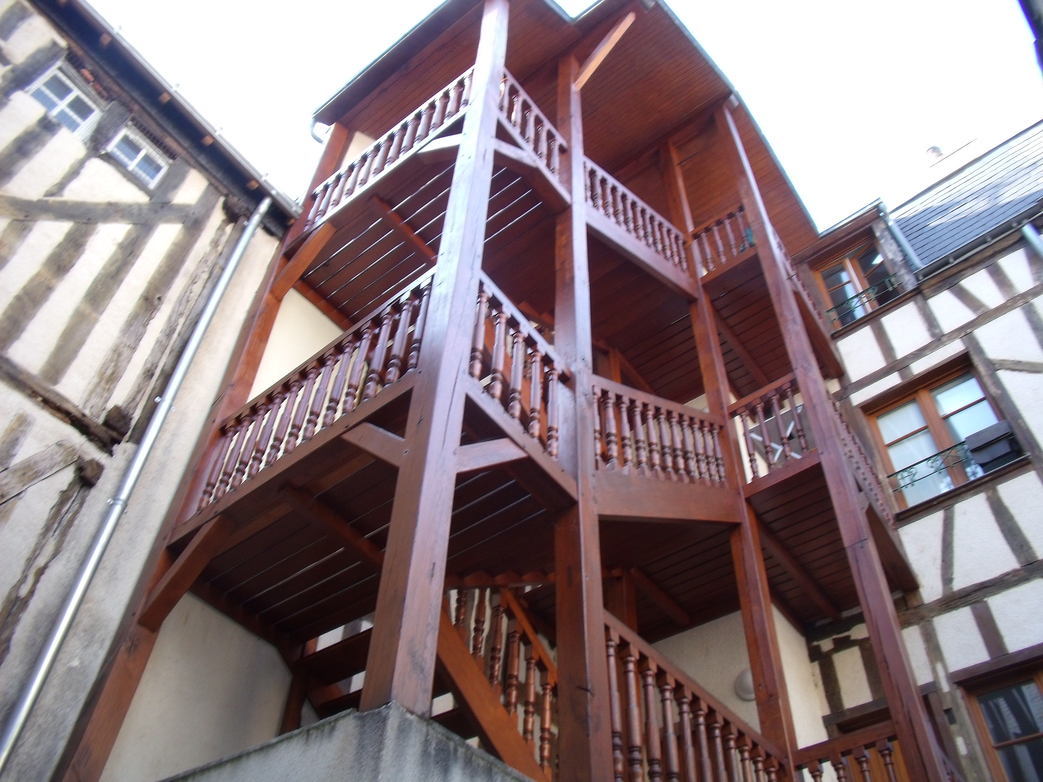 escalier-galerie en bois XVIIIe siècle, cour intérieure, 129 rue Colbert